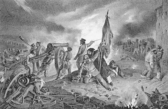 Bombardamento a Forte Marghera, nel 1849 - litografia, ridotto